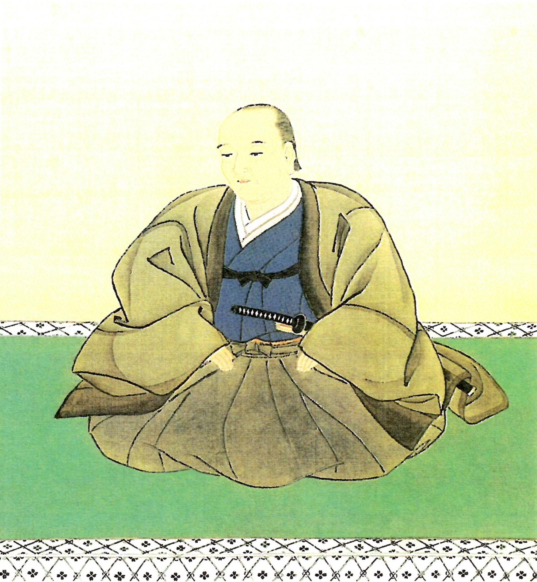 蜂須賀綱矩の肖像。